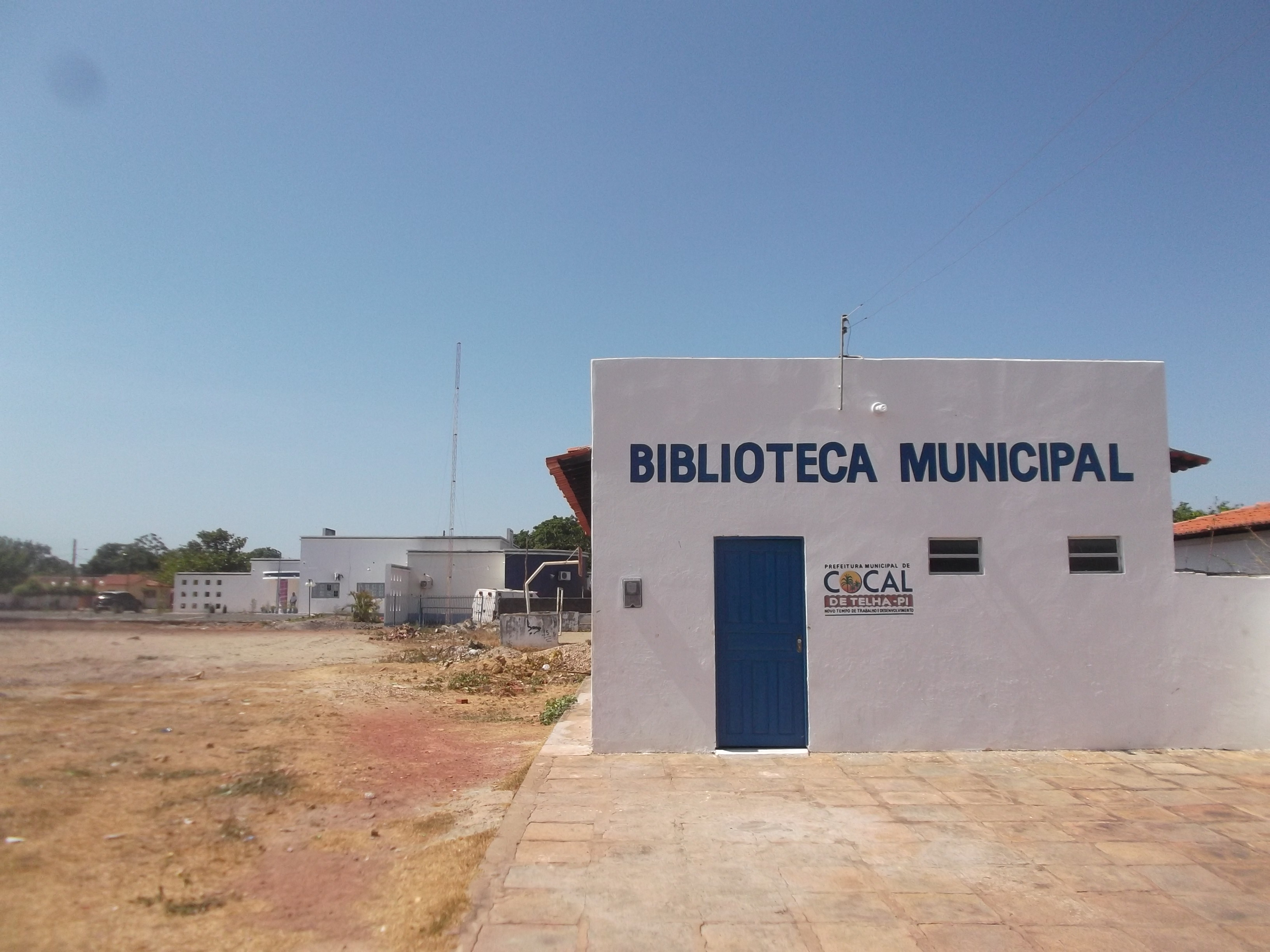 Biblioteca Pública Municipal de Cocal de Telha, no Piauí.